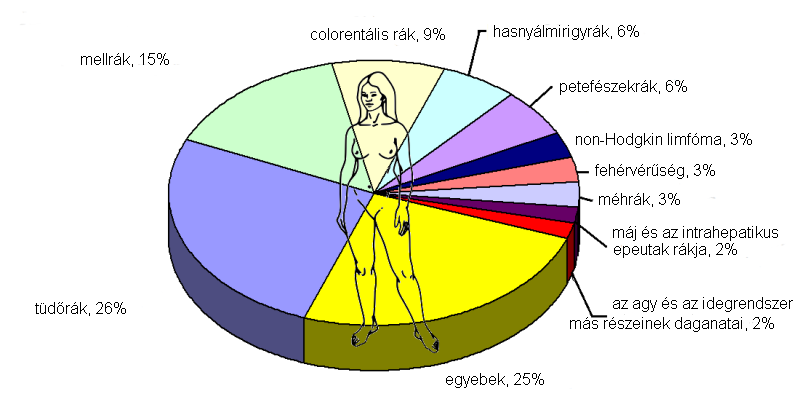 Rákos halálozás megoszlása